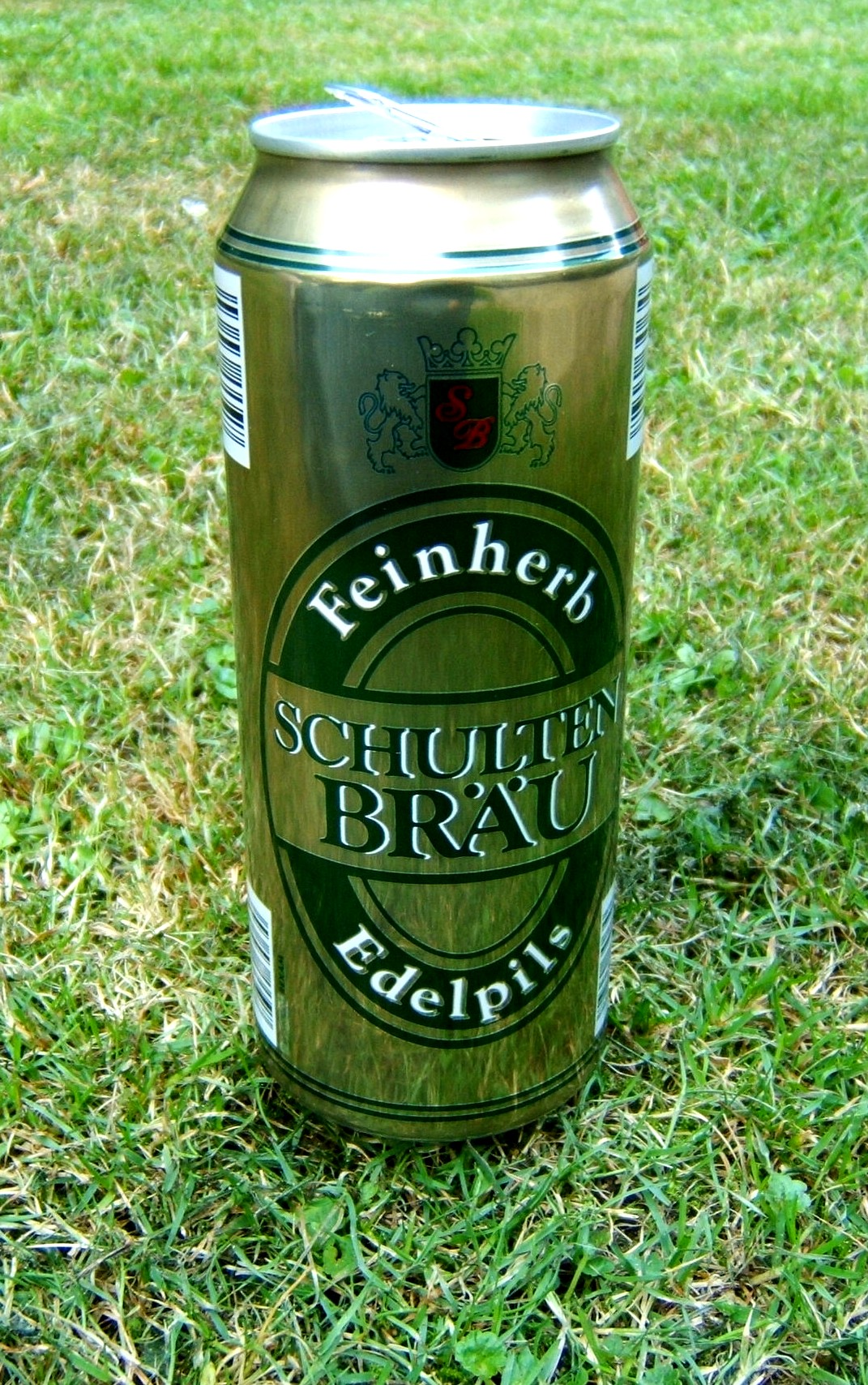 Schultenbrau